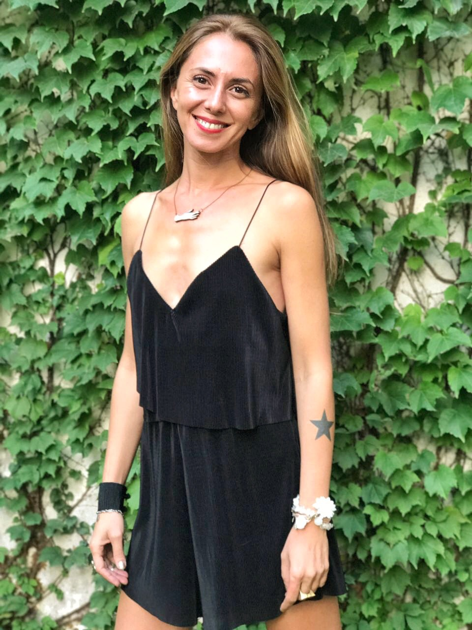 Maitena Aboitiz